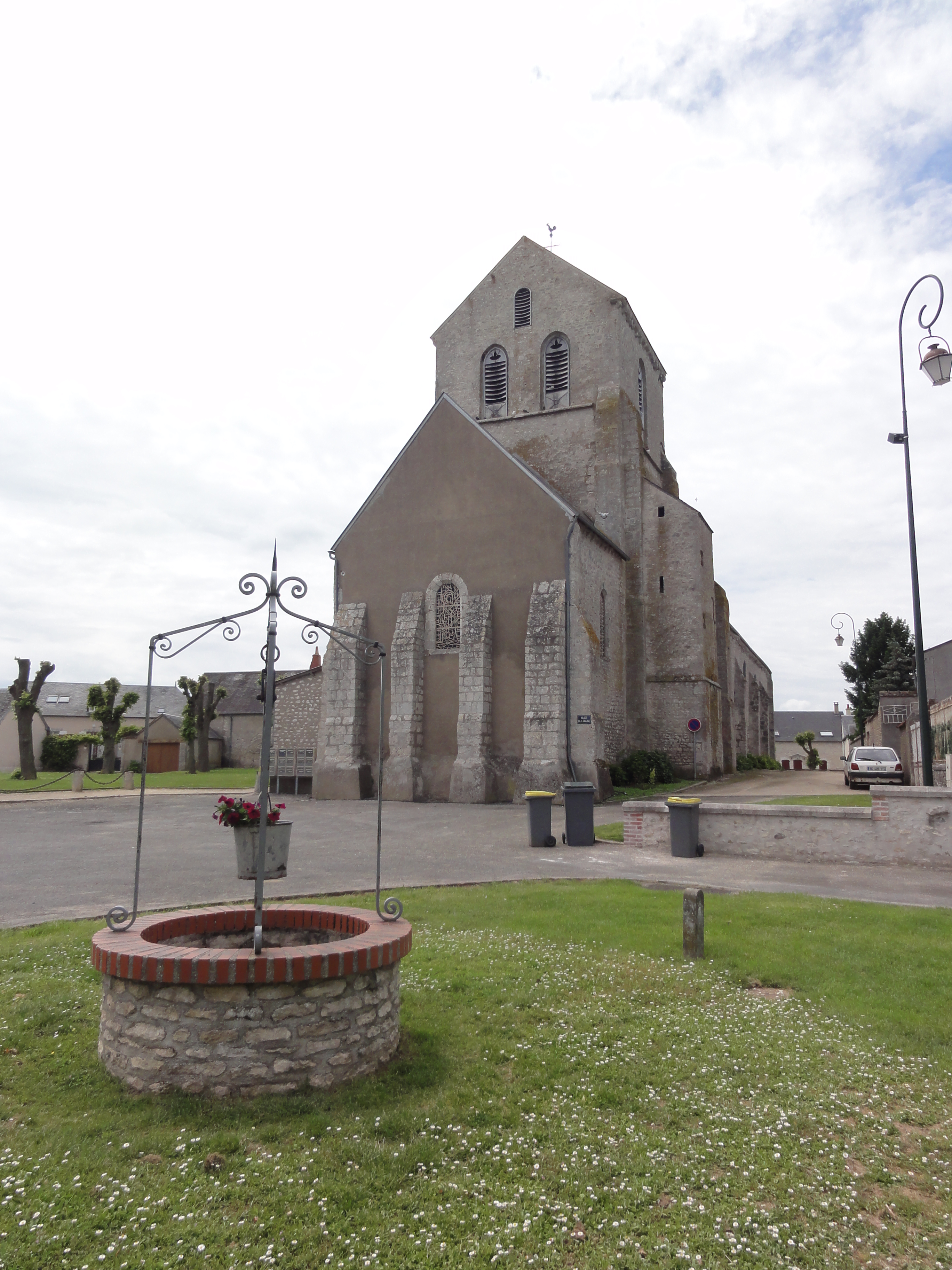 Santilly (Eure-et-Loir) Église